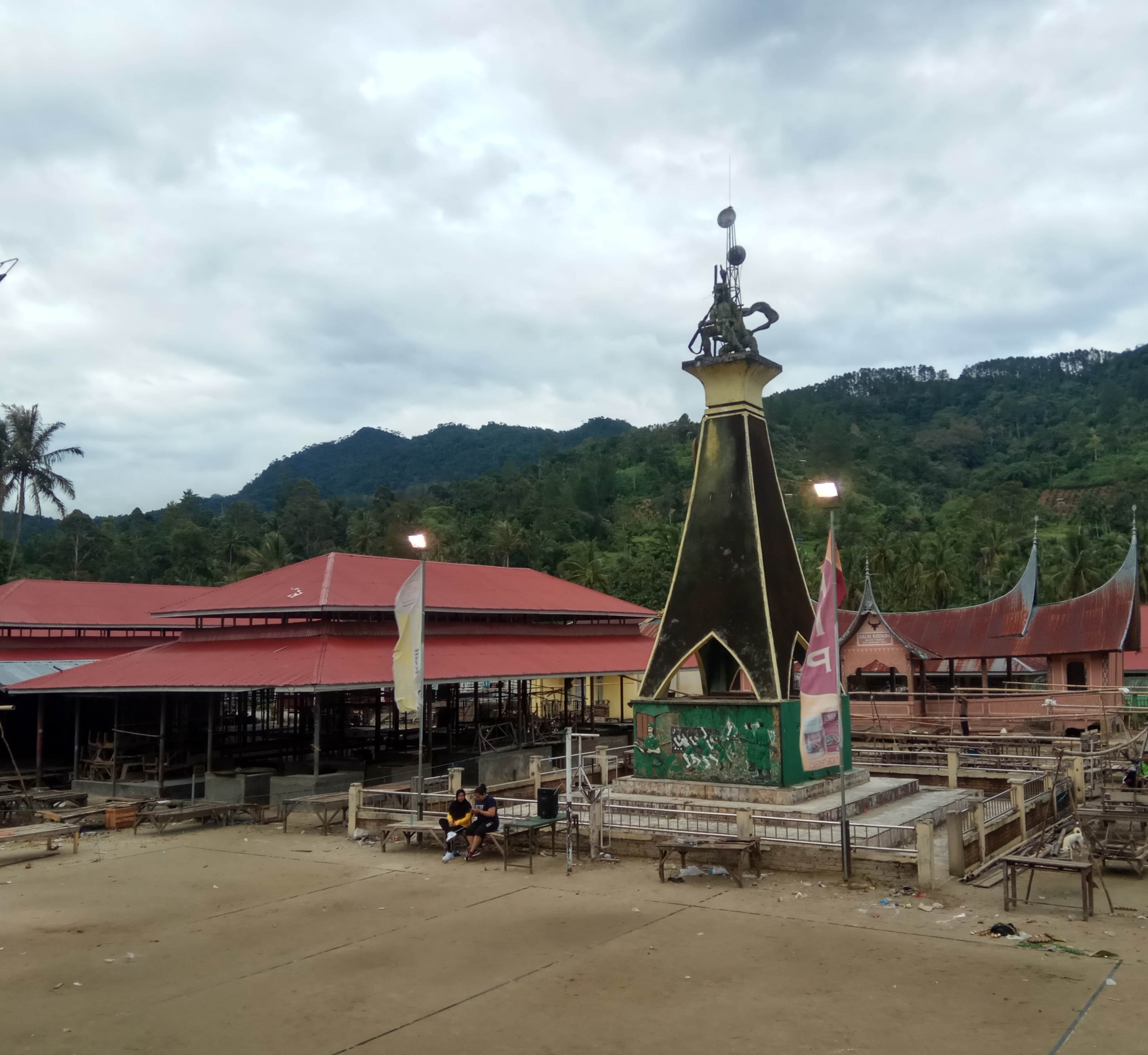 Tugu PDRI merupakan tugu peringatan perjuangan PDRI ketika menjadikan Koto Tinggi sebagai ibu kota darurat Republik Indonesia.